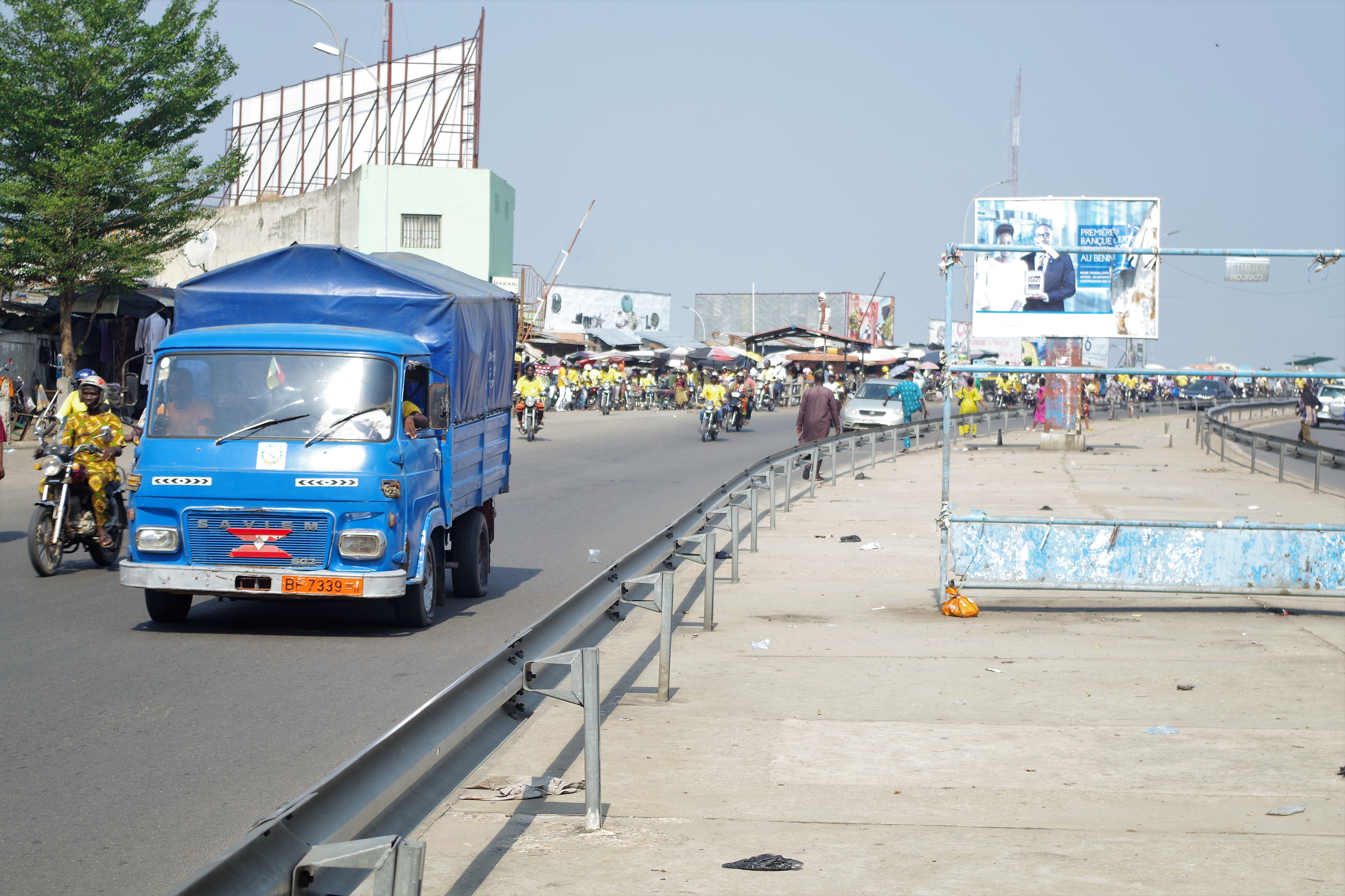 Minibus sur le pont du marché dantokpa à Cotonou Bénin This is an image with the theme "Africa on the Move or Transport" from: Benin